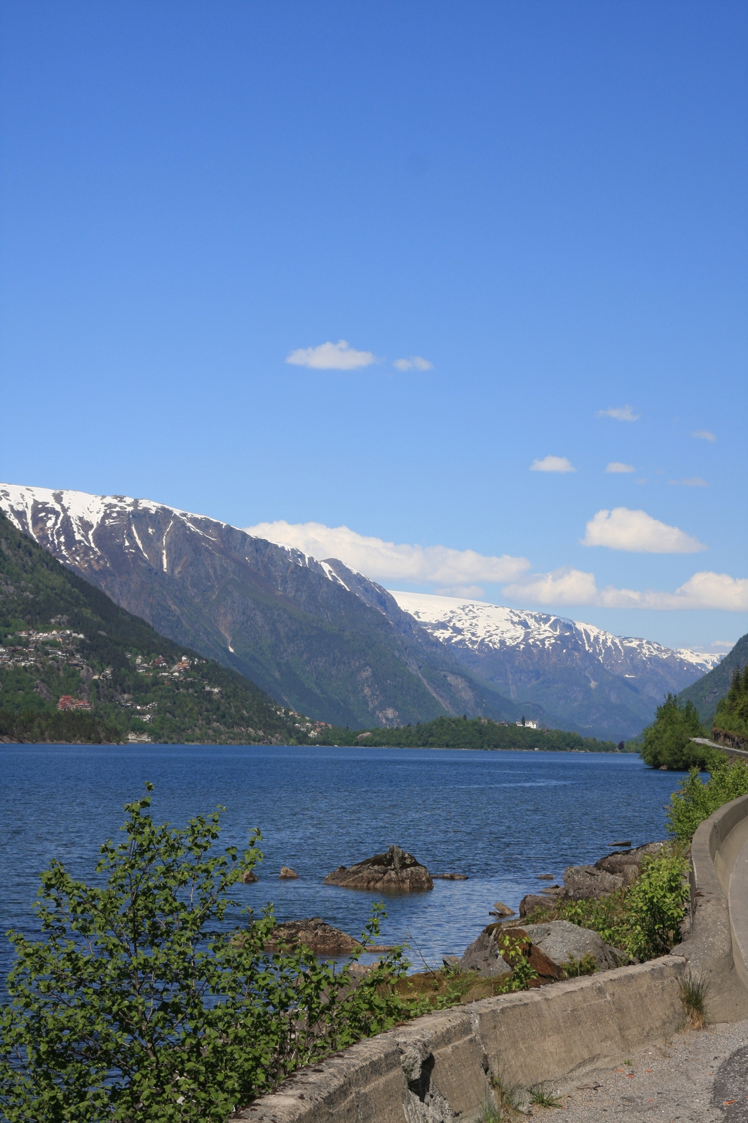 Sandvinvatnet